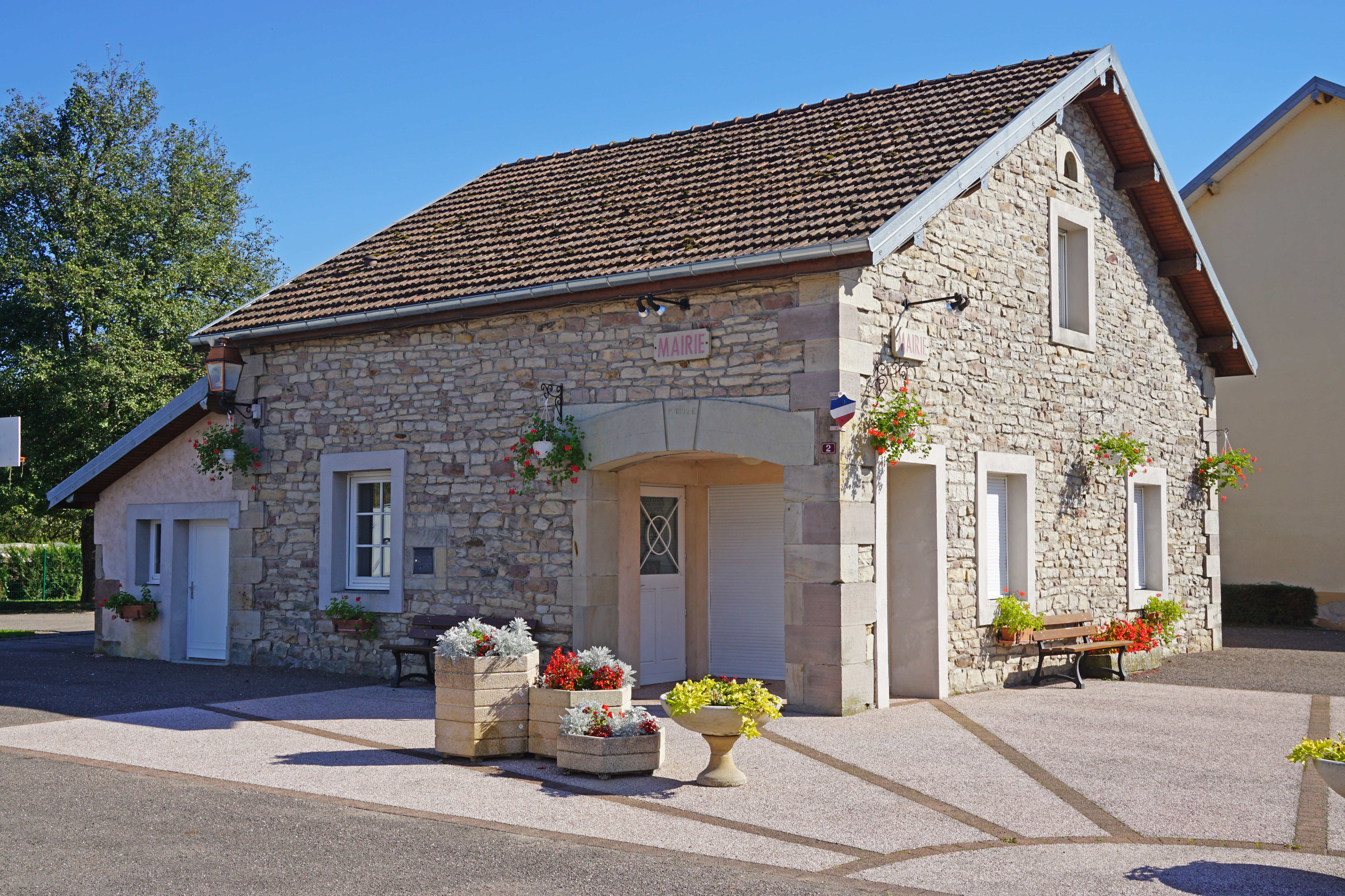 La mairie de Lantenot.